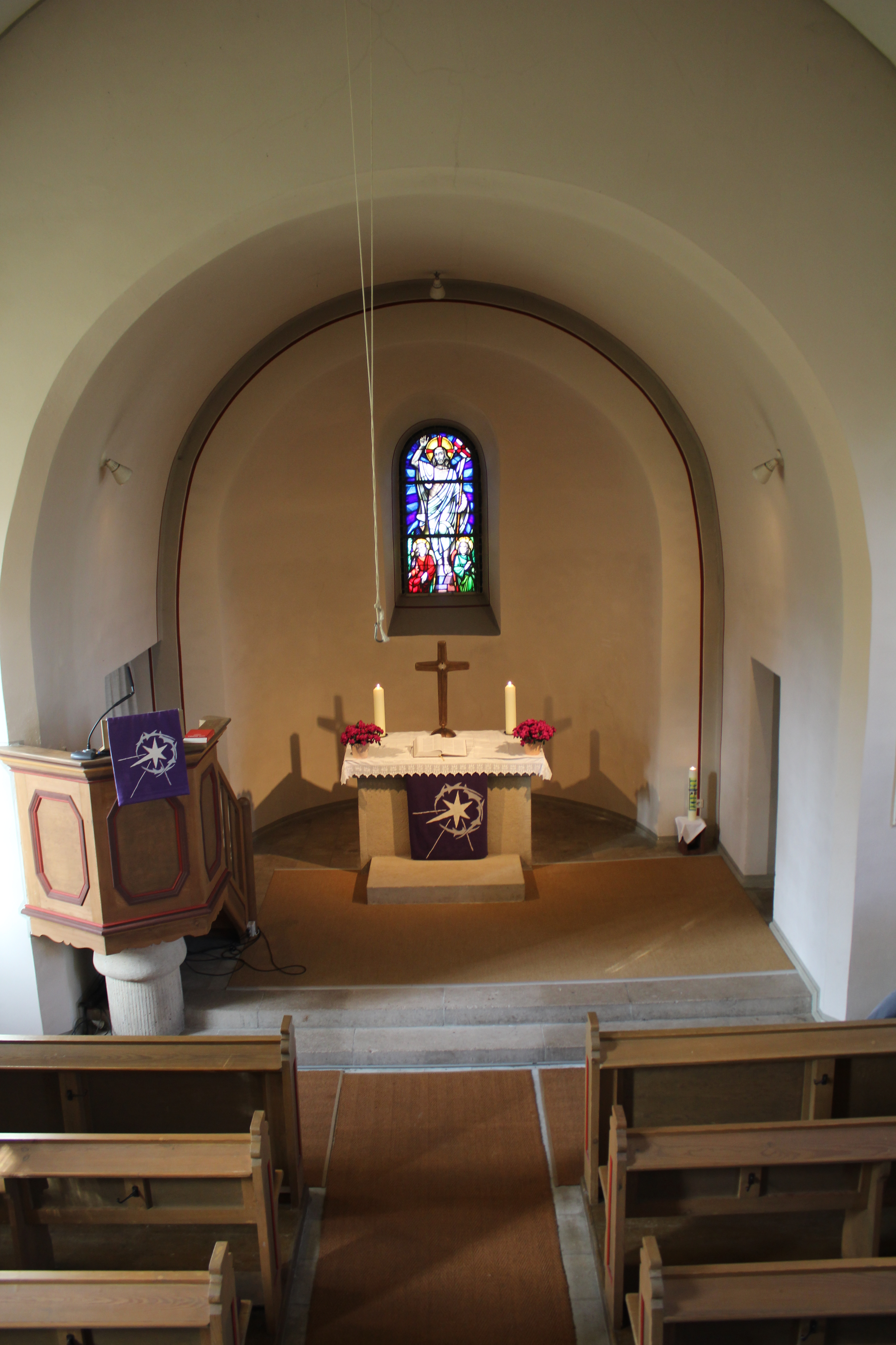 Evangelische Kirche Albshausen (Solms), Lahn-Dill-Kreis, Hessen, Deutschland